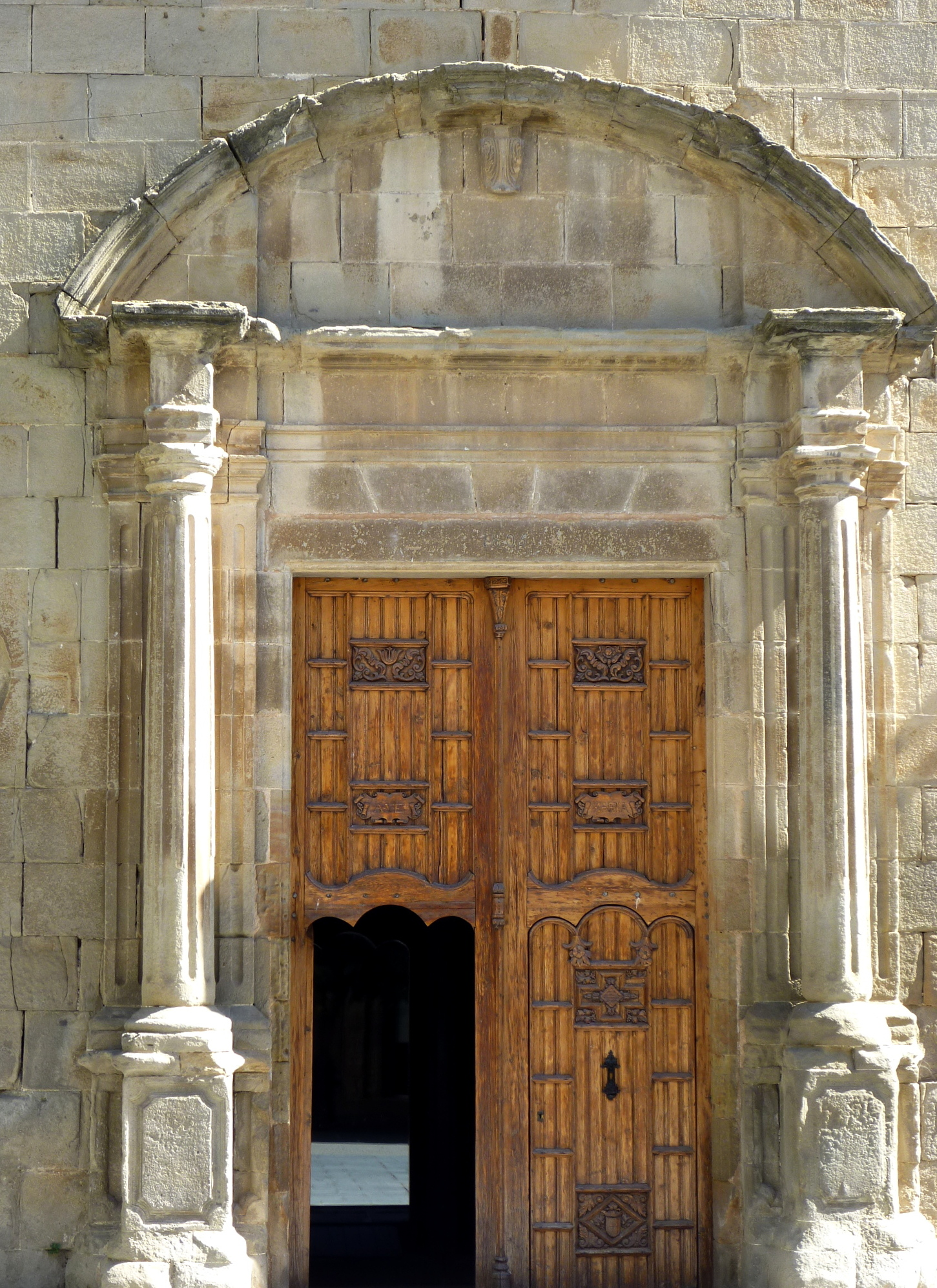 Església parroquial de Santa Maria de la Plaça (Sanaüja)